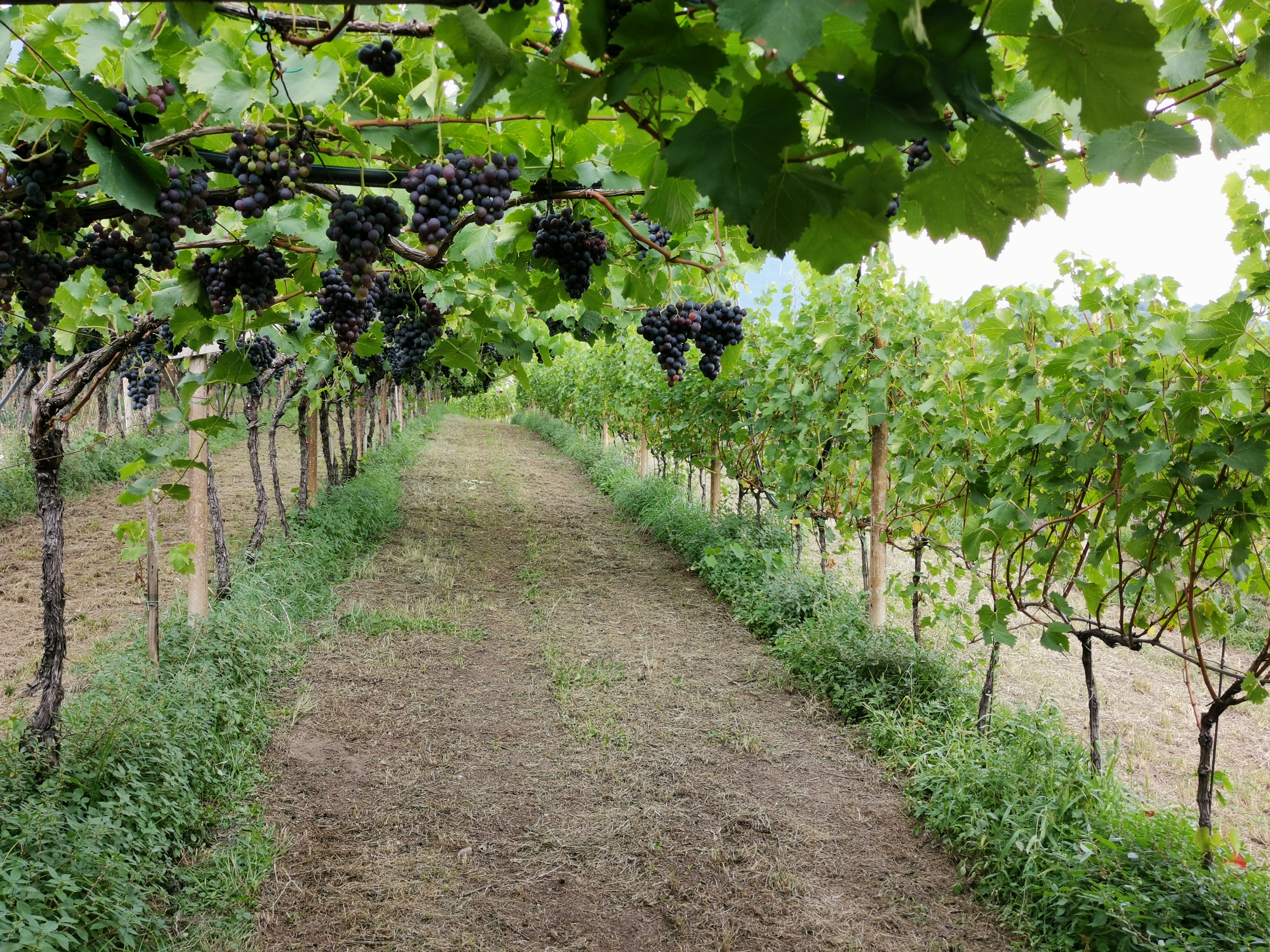 Vernatsch-Rebstöcke in Südtirol